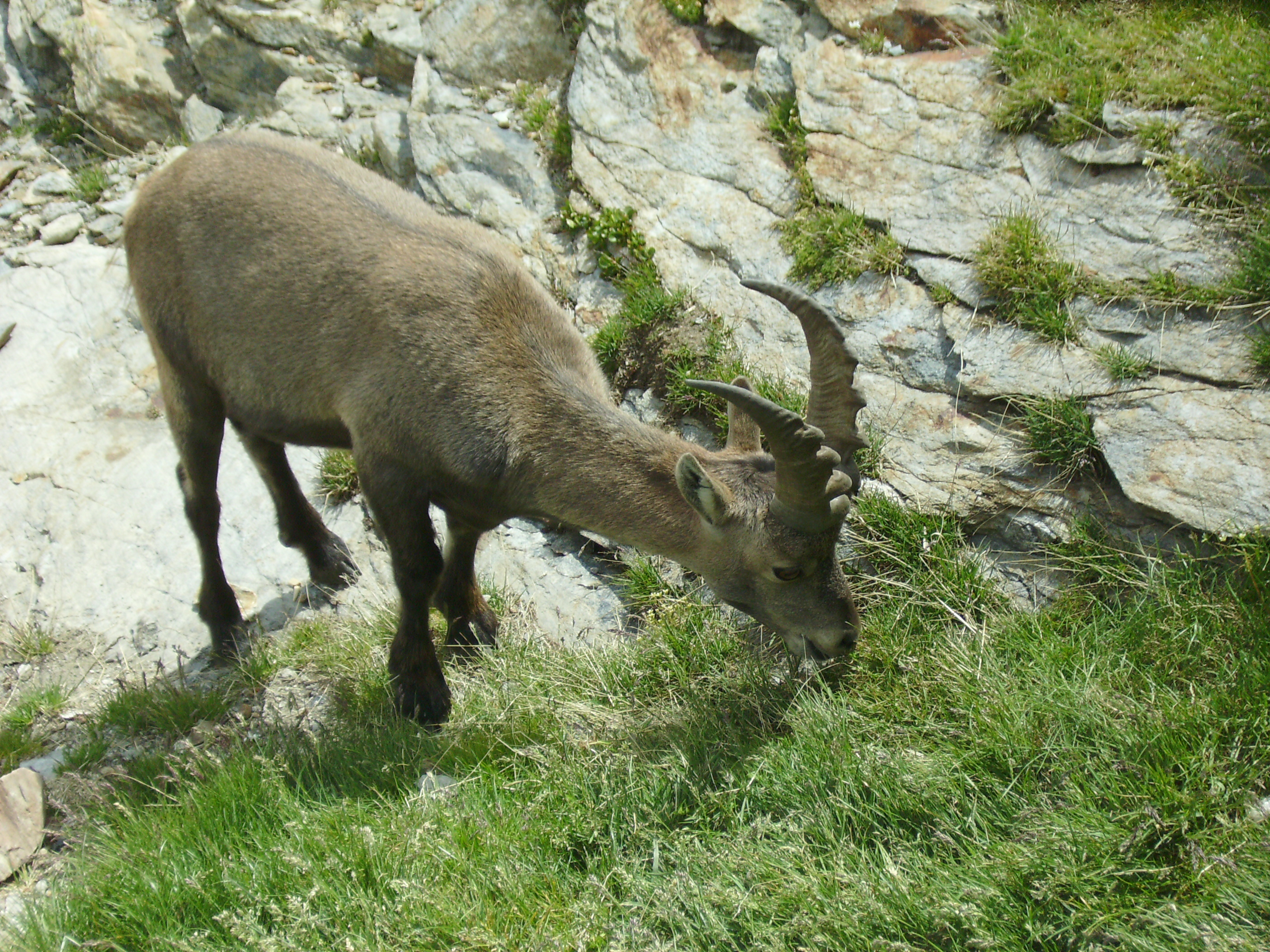 Un giovane esemplare di stambecco nei pressi del Rifugio Perucca-Vuillermoz